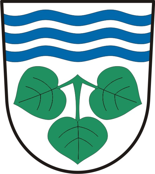 Tišice